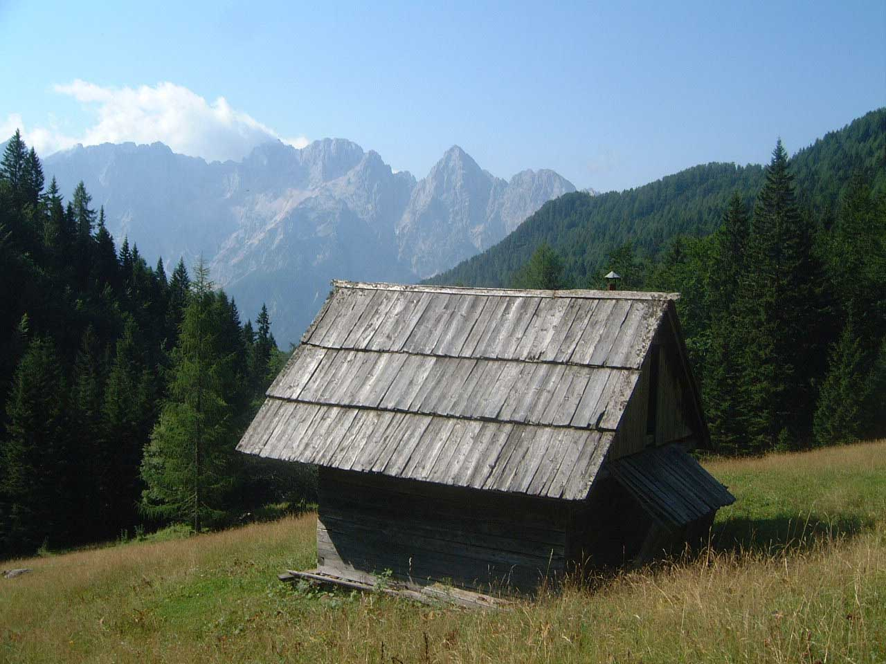 Špik mountain range in Julian Alps near Kranjska Gora, Slovenia photo:Ziga 12:03, 16 April 2007 (UTC)